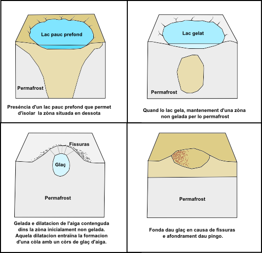 Esquèma generau de formacion d'un pingo.